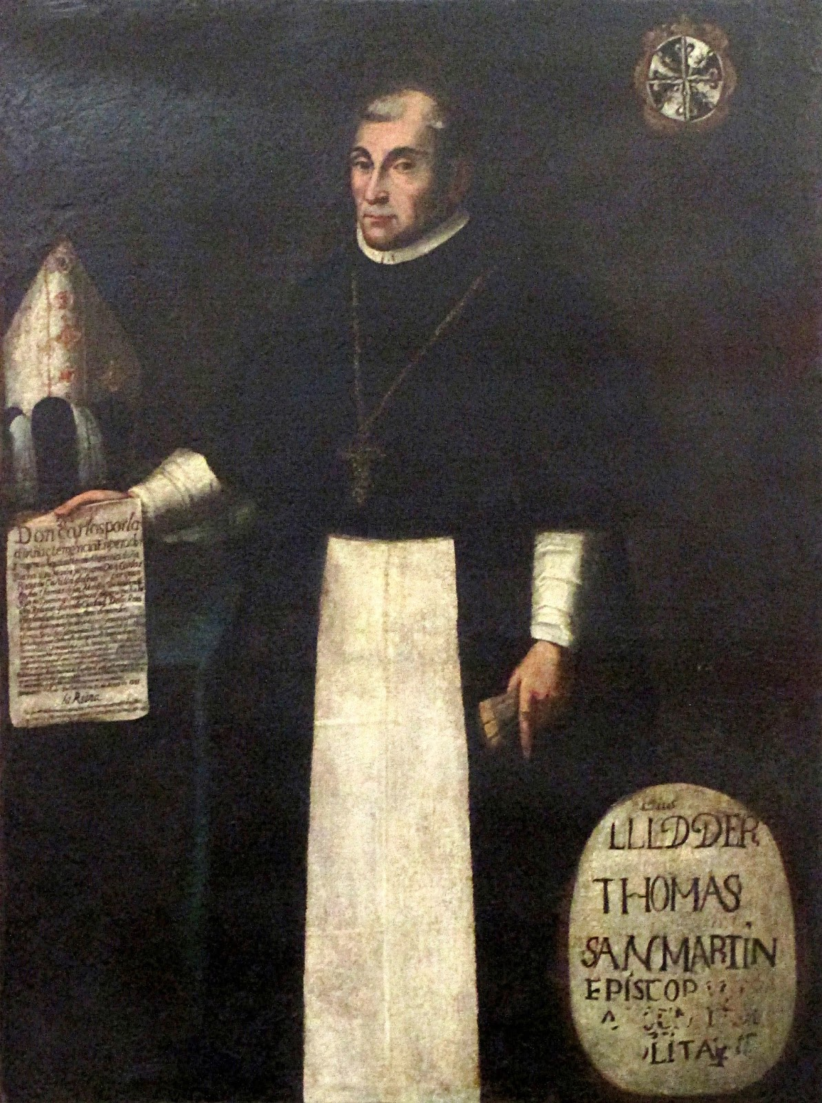 Fray Tomás de San Martín (1482 – 1555), O.P., fundador de la UNMSM